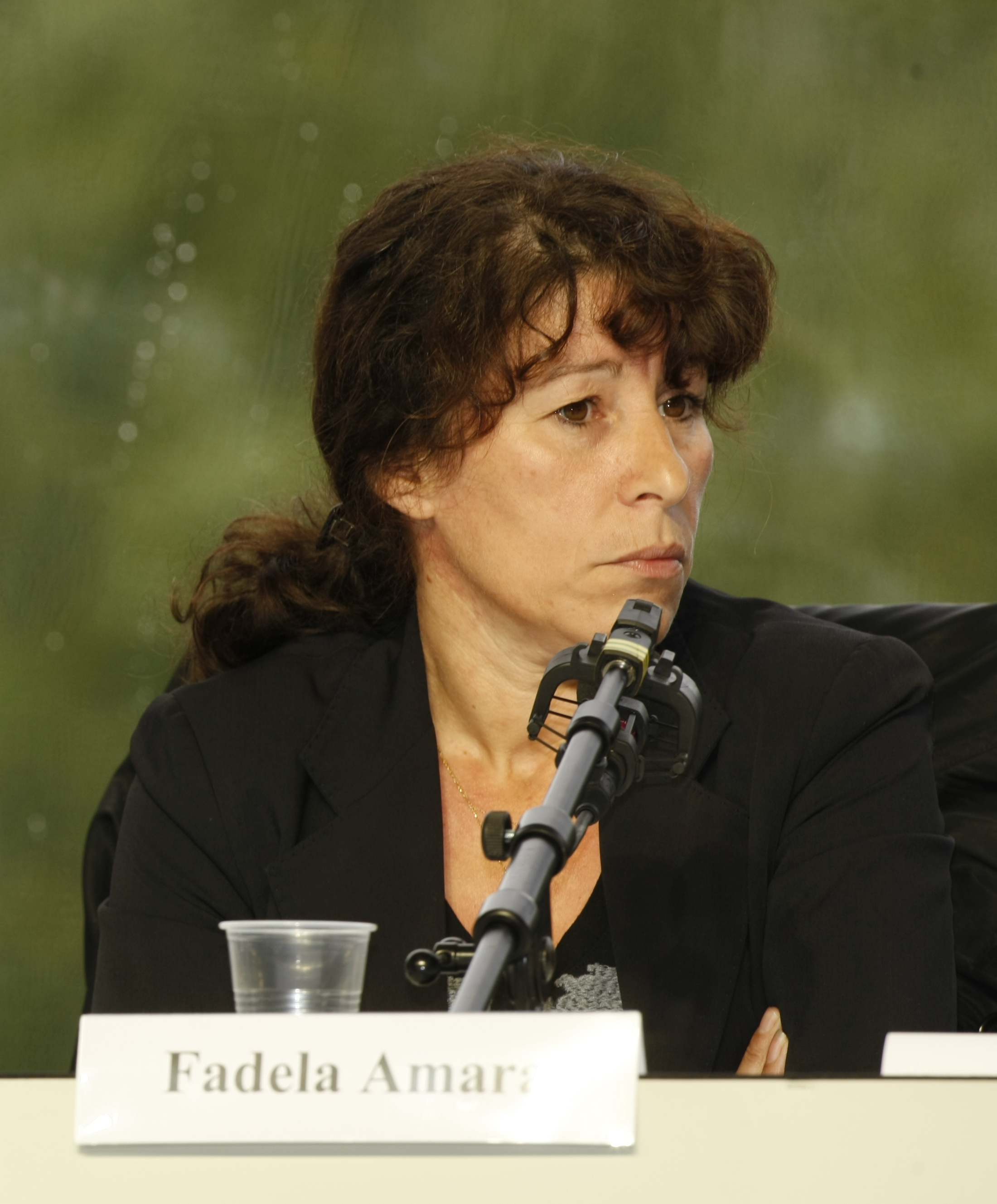 Fadela Amara le 4 septembre 2009.